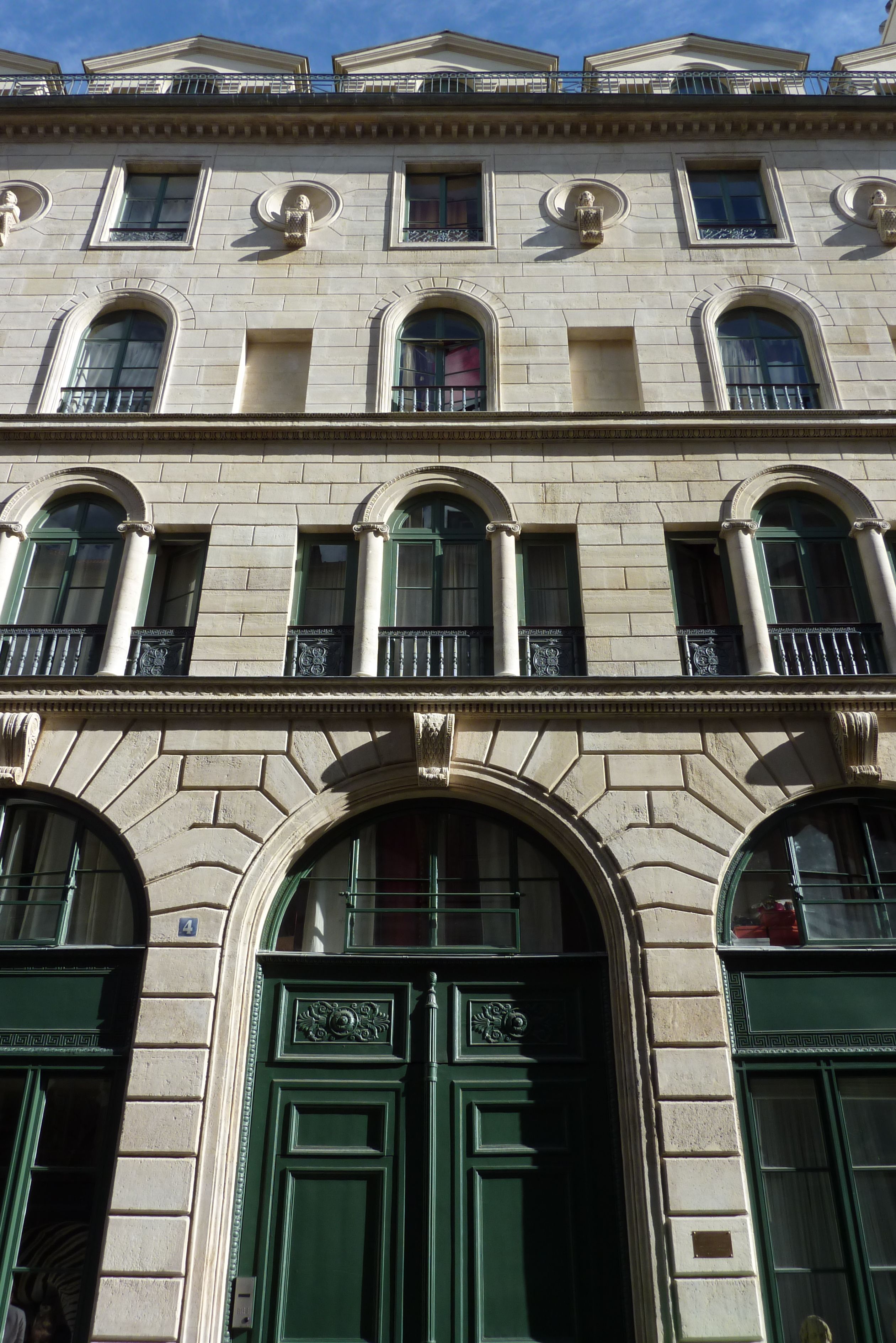 Portal und Etagen des Hauses 4, rue d'Aboukir in Paris (2. Arrondissement), Architekt: Jules de Joly